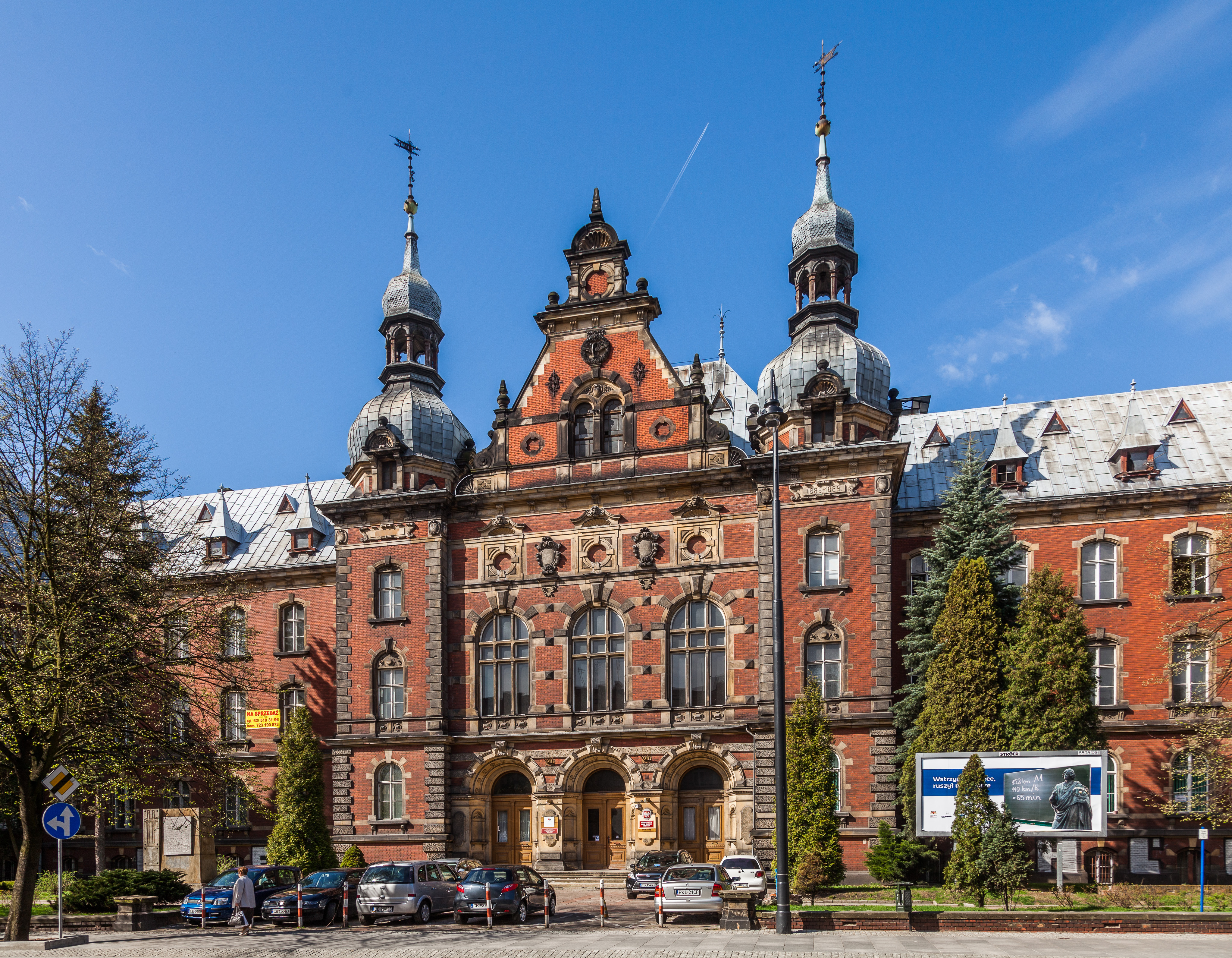 Budynek dawnej Kolei Wschodniej w Bydgoszczy, ul. Dworcowa 63.